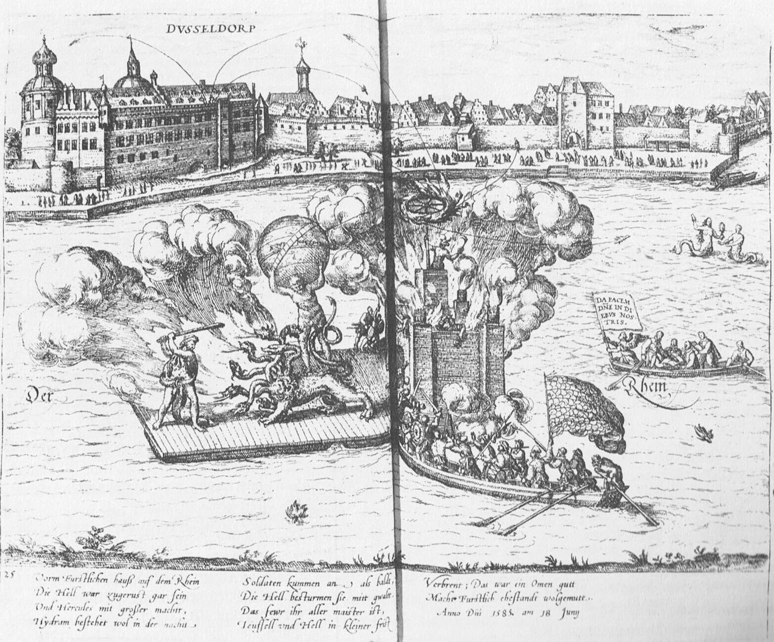 Kupferstich aus Dietrich Graminäus: Beschreibung der fürstlich jülichschen Hochzeit 1585